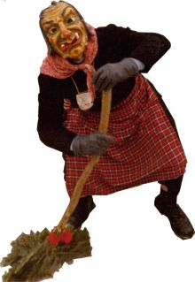 Neue Empfinger Fasnetshexe